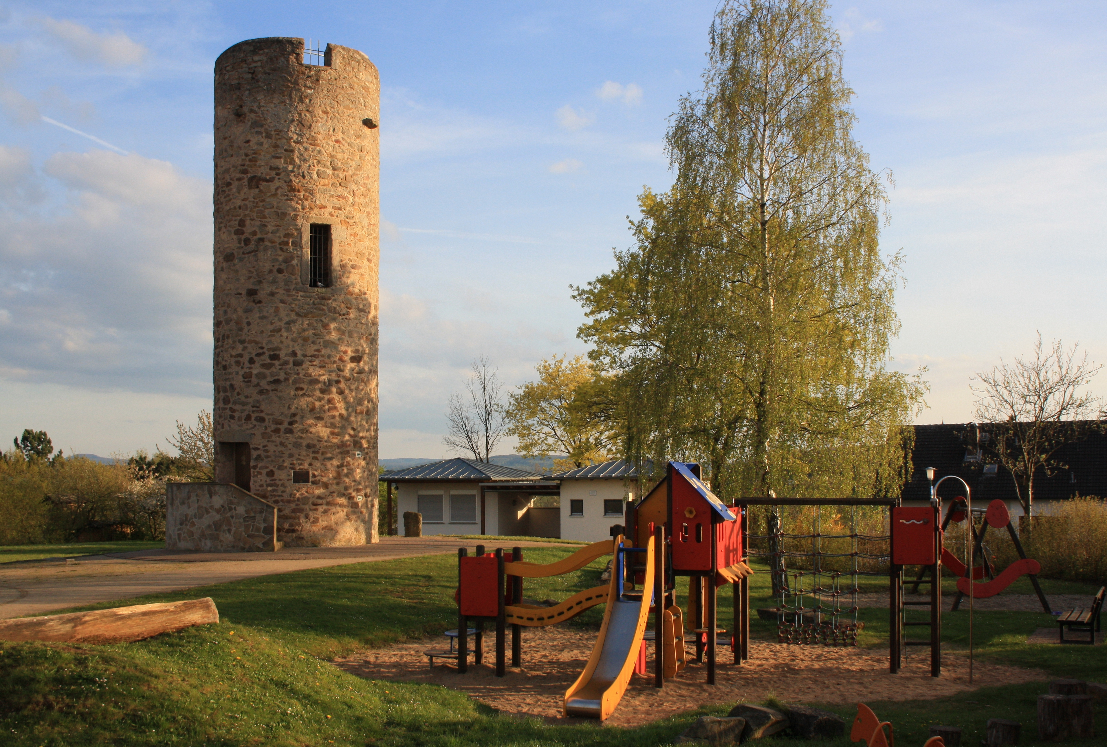 Der ehemalige W"artturm und heutige Aussichtsturm "Dicker Turm" im Wohnplatz Dicker Turm im Ortsteil Dirlos der Gemeinde Künzell